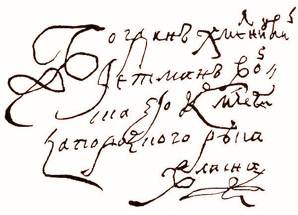 Signature of Khmelnytsky (Bohdan Xmelnitkyi, hetman Voiska Zaporozkoho, eho K(orolevskoi) milosti, ruka vlasna - Bohdan Xmelnitkyi, Hetman of Zaporozhian Army, of his king's majesty, own hand)